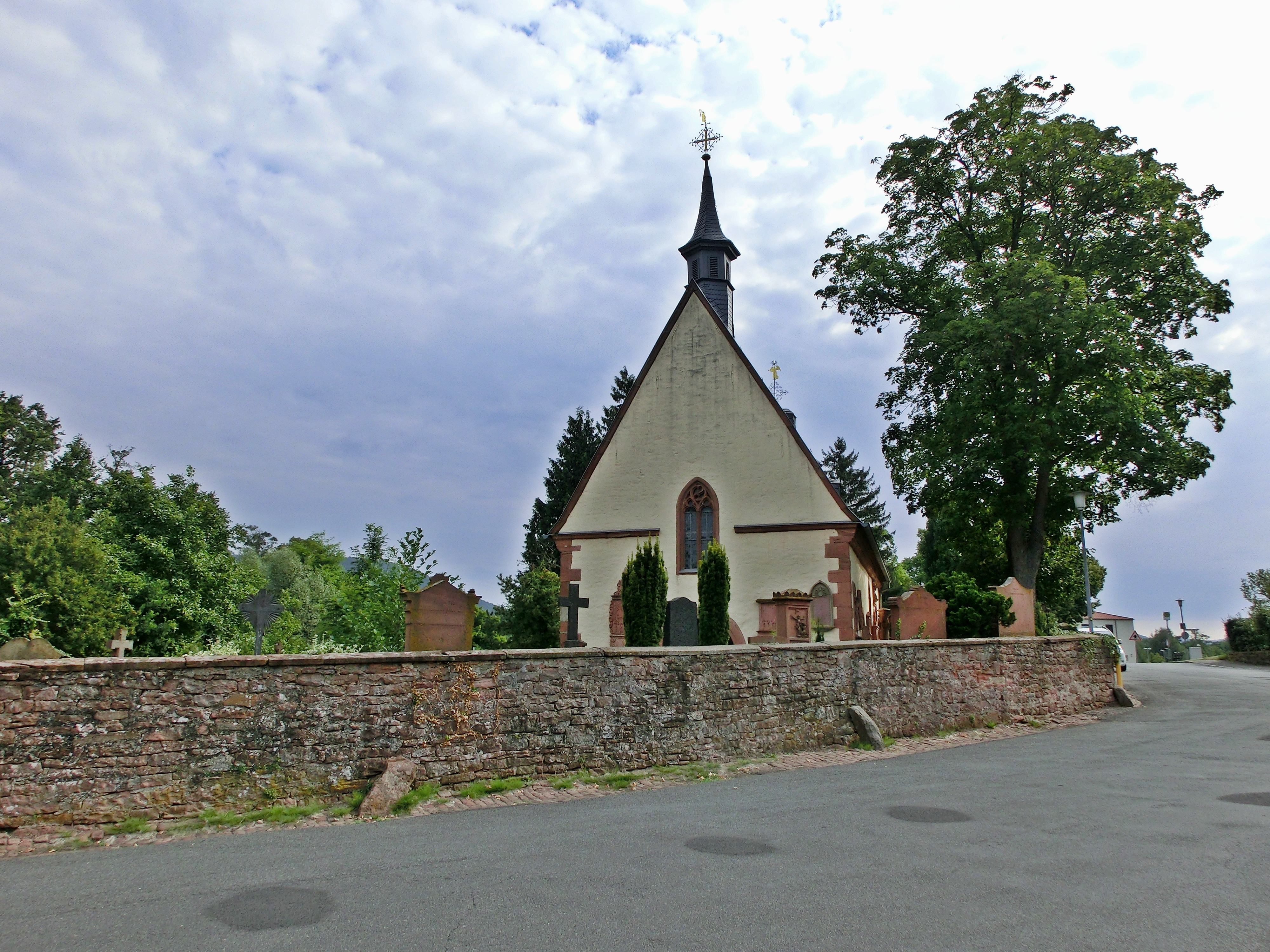 Die Laurentiuskapelle in Miltenberg, Unterfranken.